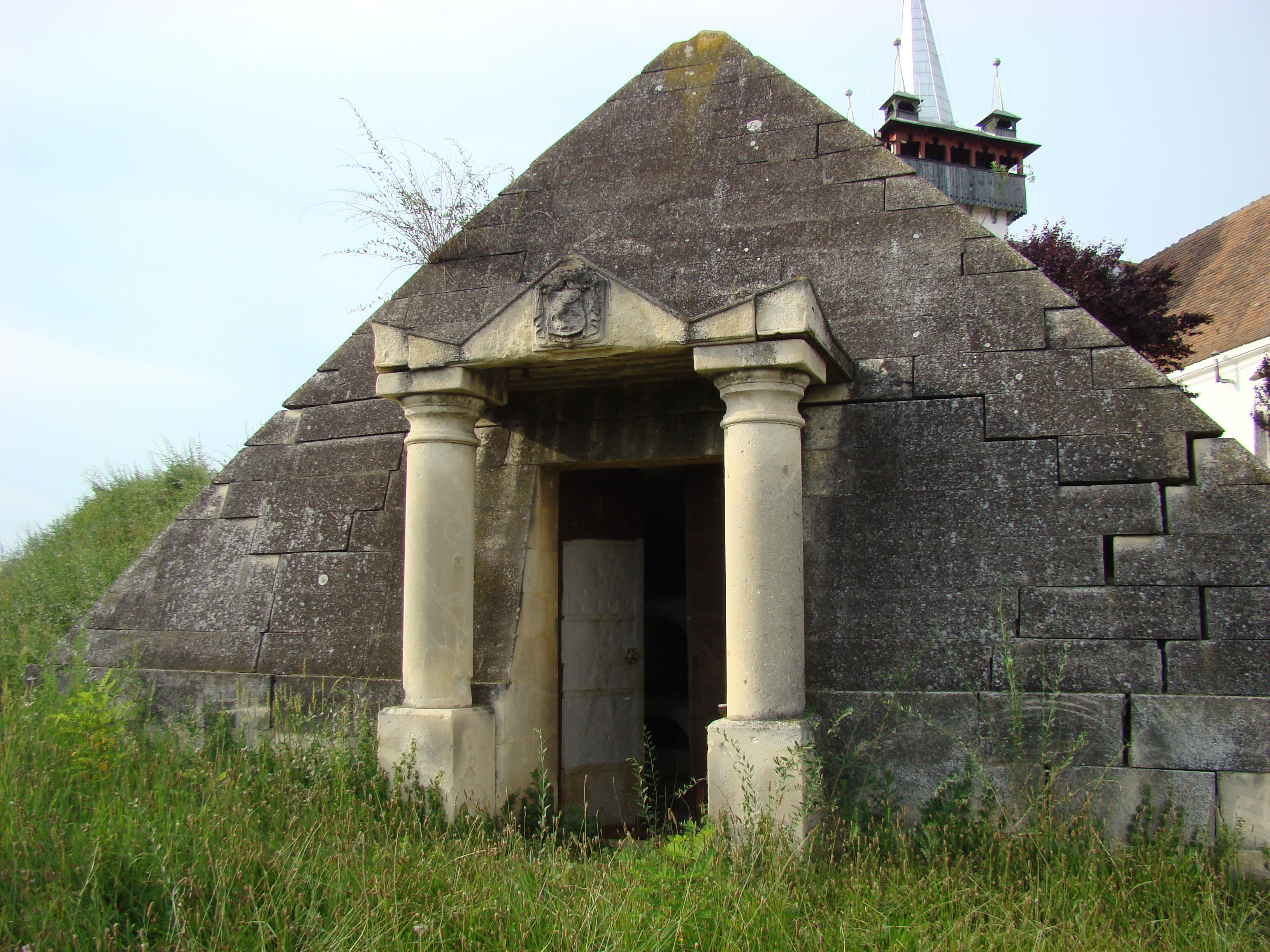 Cripta Kemeny Arpad, sat aparținător Ciumbrud; municipiul Aiud 02